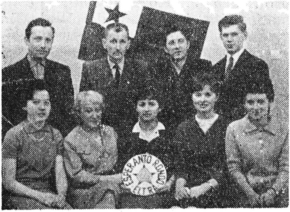 Bydgoszcz. En la fabriko de radioaparatoj „Eltra” en Bydgoszcz ekzistas Esp. Rondo. De niaj ĉarmaj gesamideanoj laste ni ricevis la foton kun informoj, ke ili sukcesis aranĝi kurson kaj sukcese kunlaboras kun la lokaj esperantistoj.